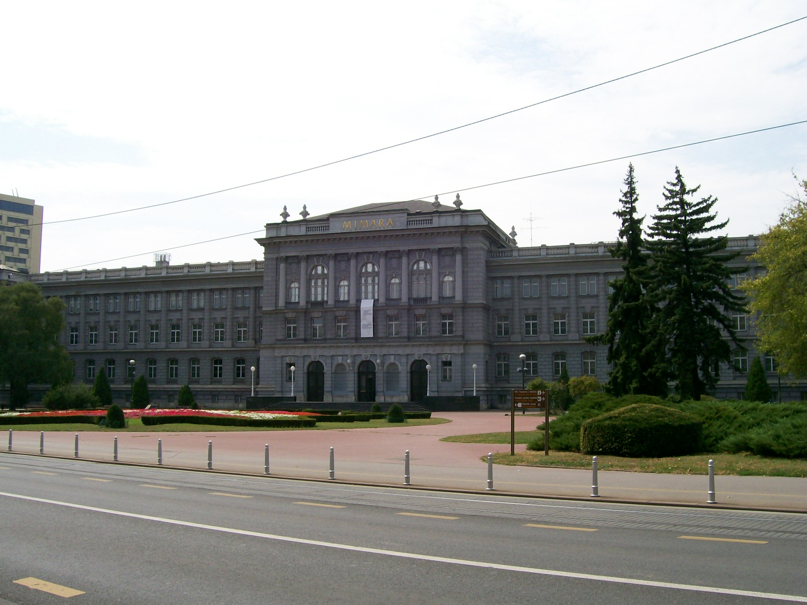 Muzej Mimara, Zagreb